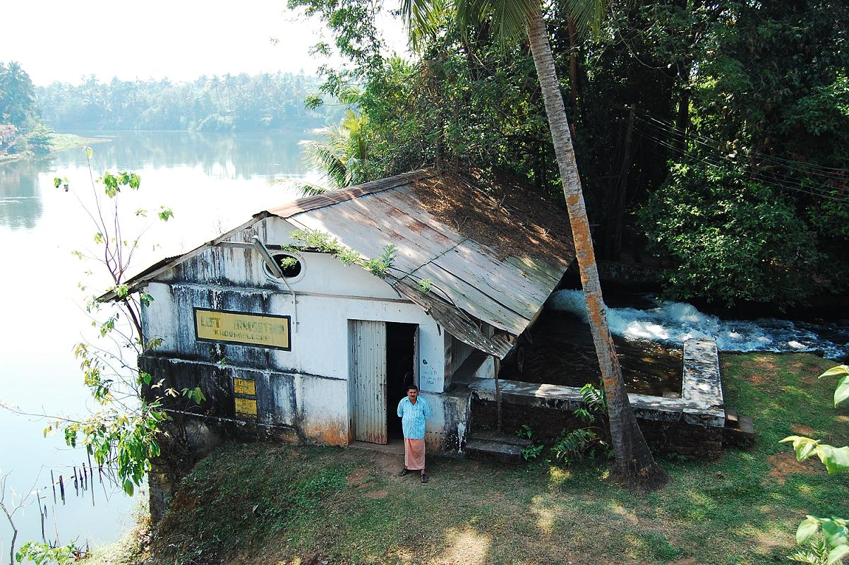 ആലുവയിൽ സ്ഥാപിച്ചിട്ടുള്ള ലിഫ്റ്റ് ഇറിഗേഷന് പമ്പിങ്ങ് സ്റ്റേഷൻ. കടുങ്ങല്ലൂരിലേക്ക് ജലം കൊണ്ടഉ പോകുന്നു